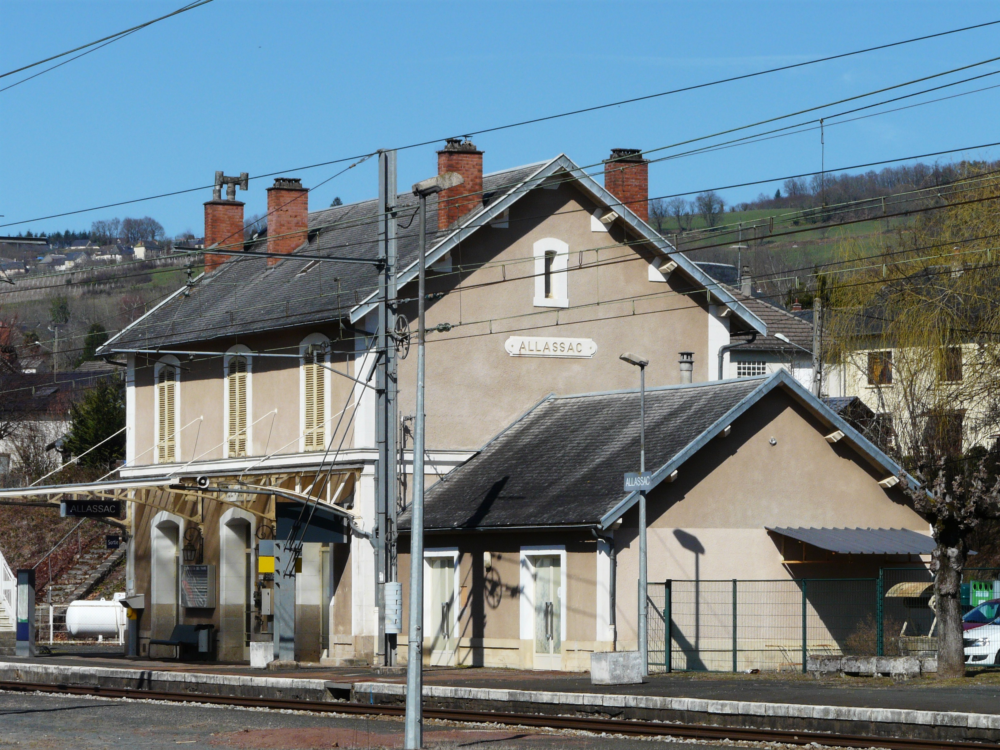 La gare d'Allassac, Corrèze, France.